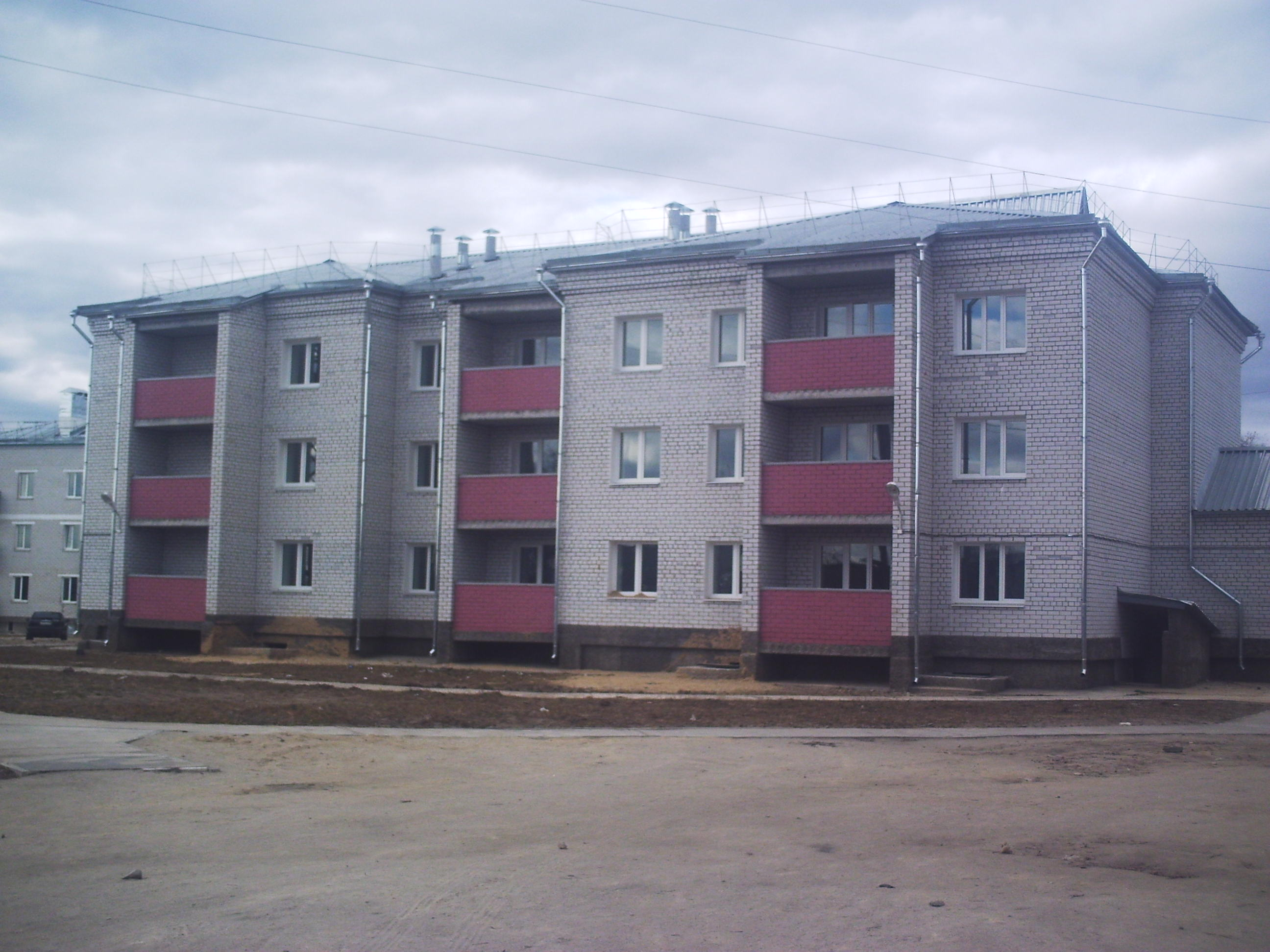 новый дом